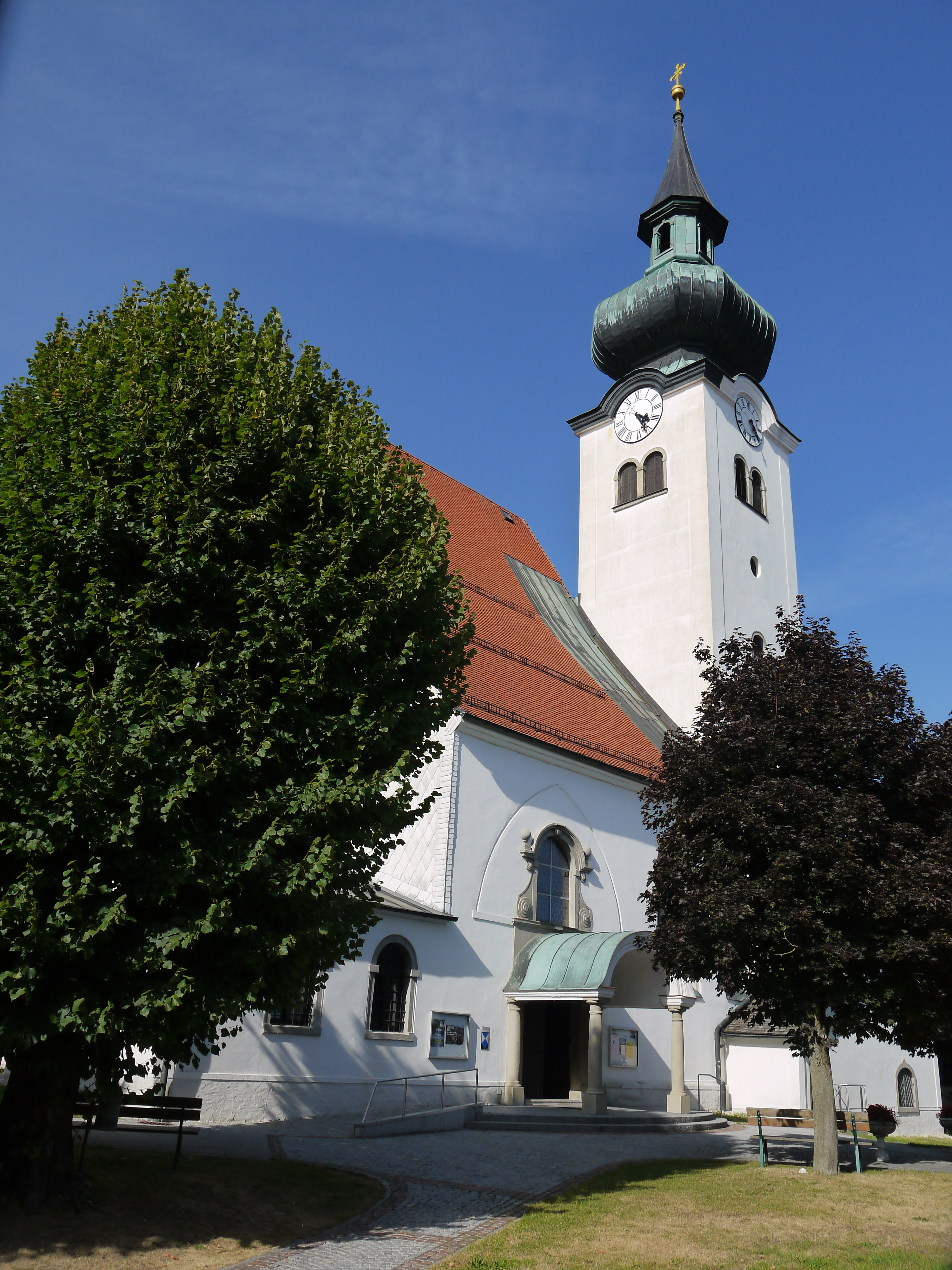 Kath. Pfarrkirche hl. Gallus und ehem. Friedhof